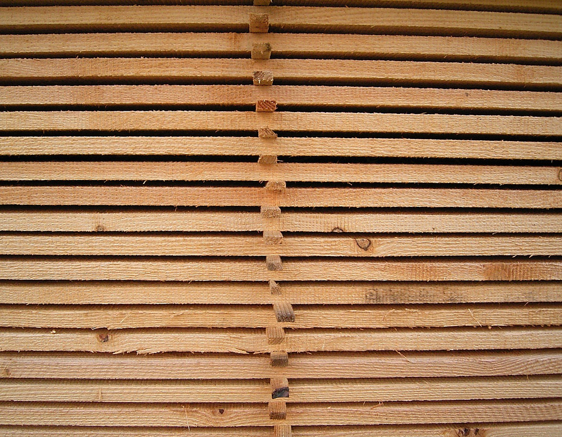 Wooden boards